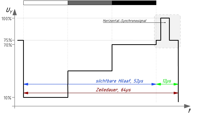 Dëst Bild weist BAS-Signal, wéi et am Videosignal virkennt